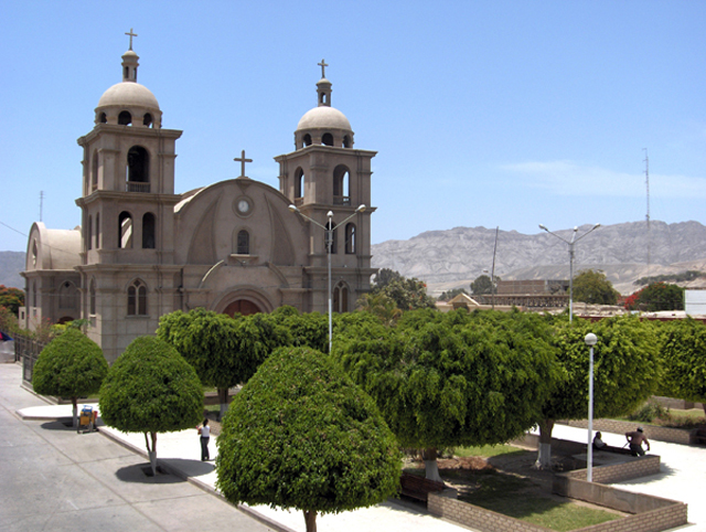 Iglesia de San Cristobal y Plaza de Armas de Palpa (Ica-Perú).